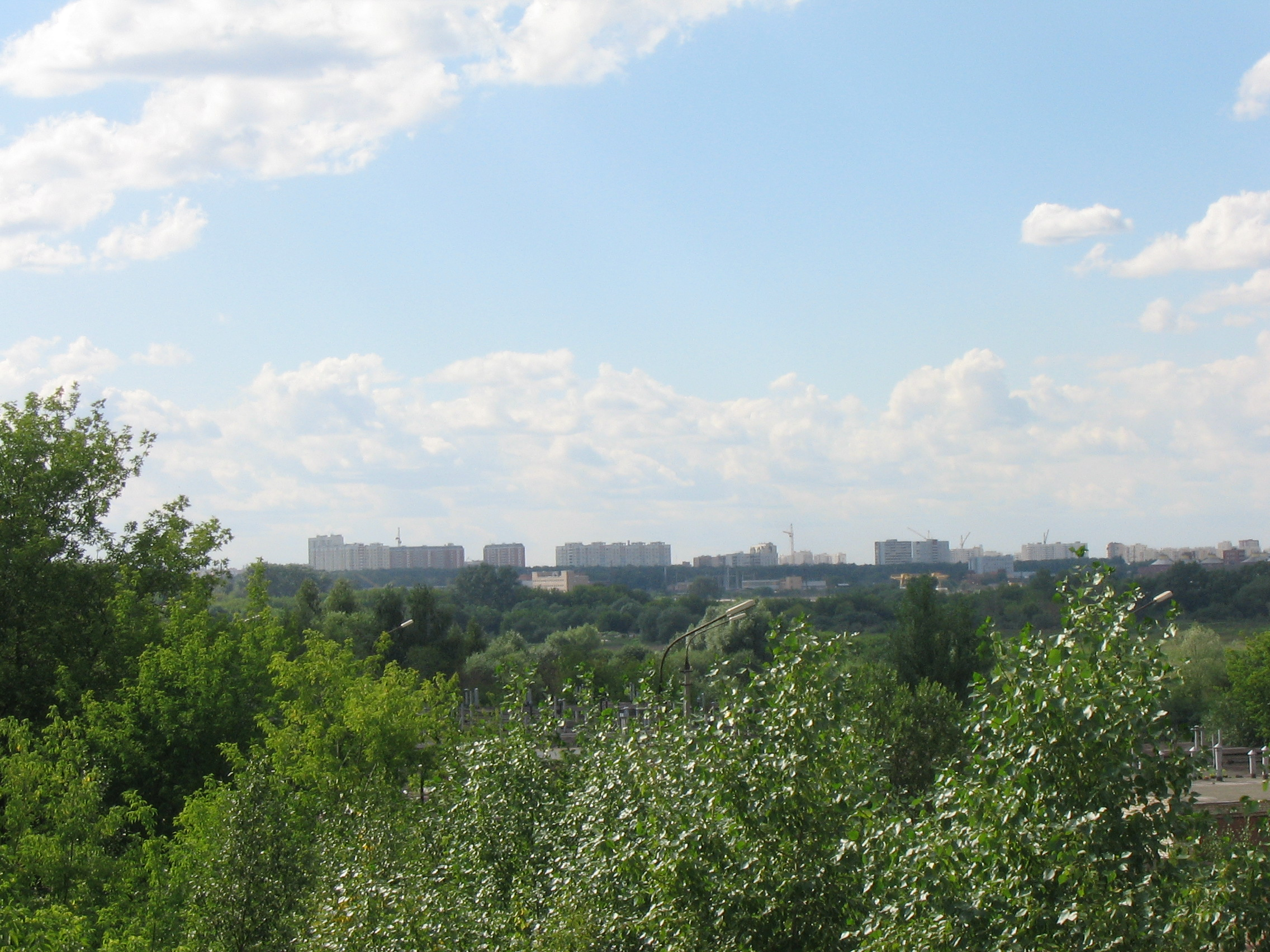 вид с ж\д насыпи